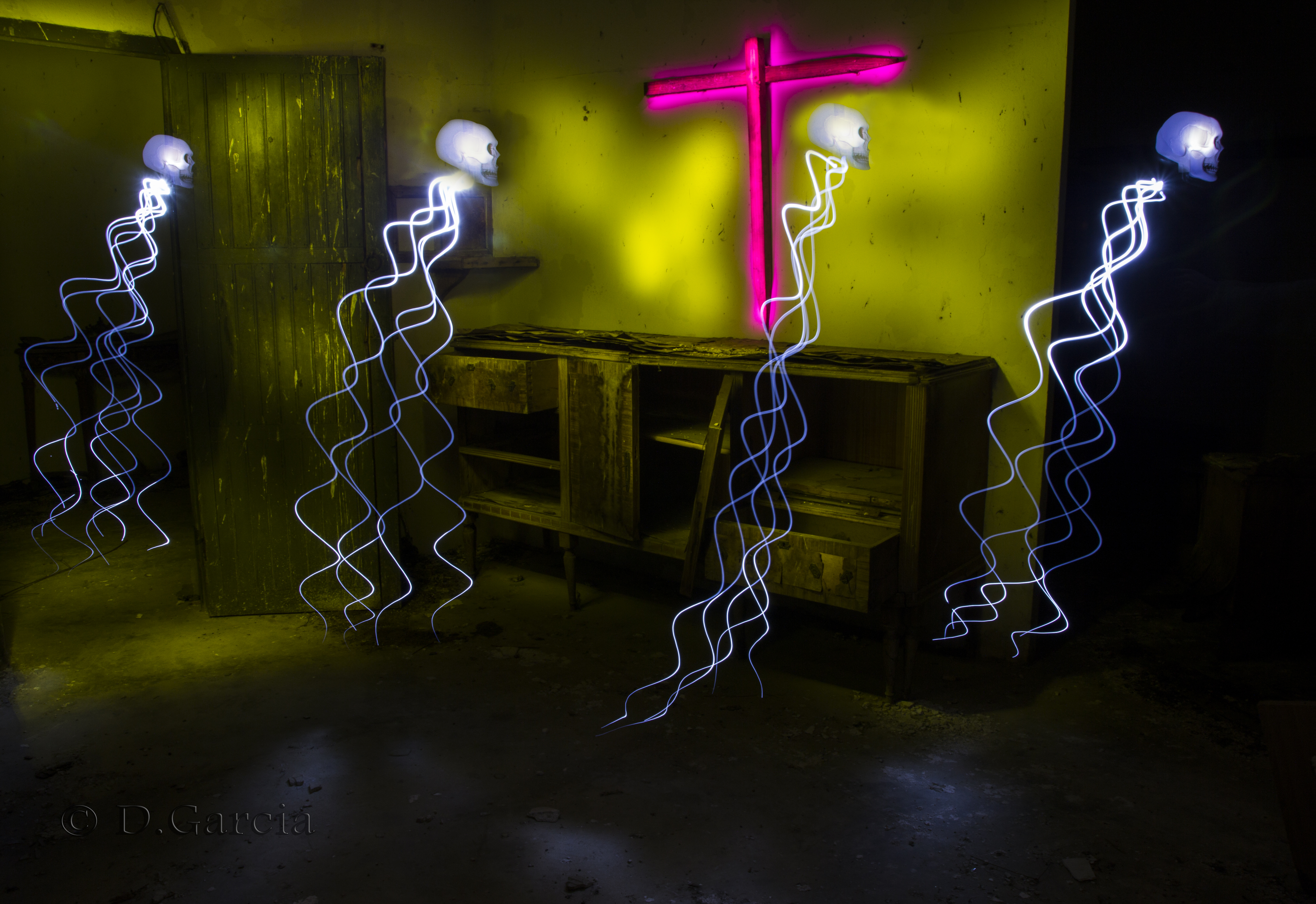 Fantasmas + iluminacion selectiva